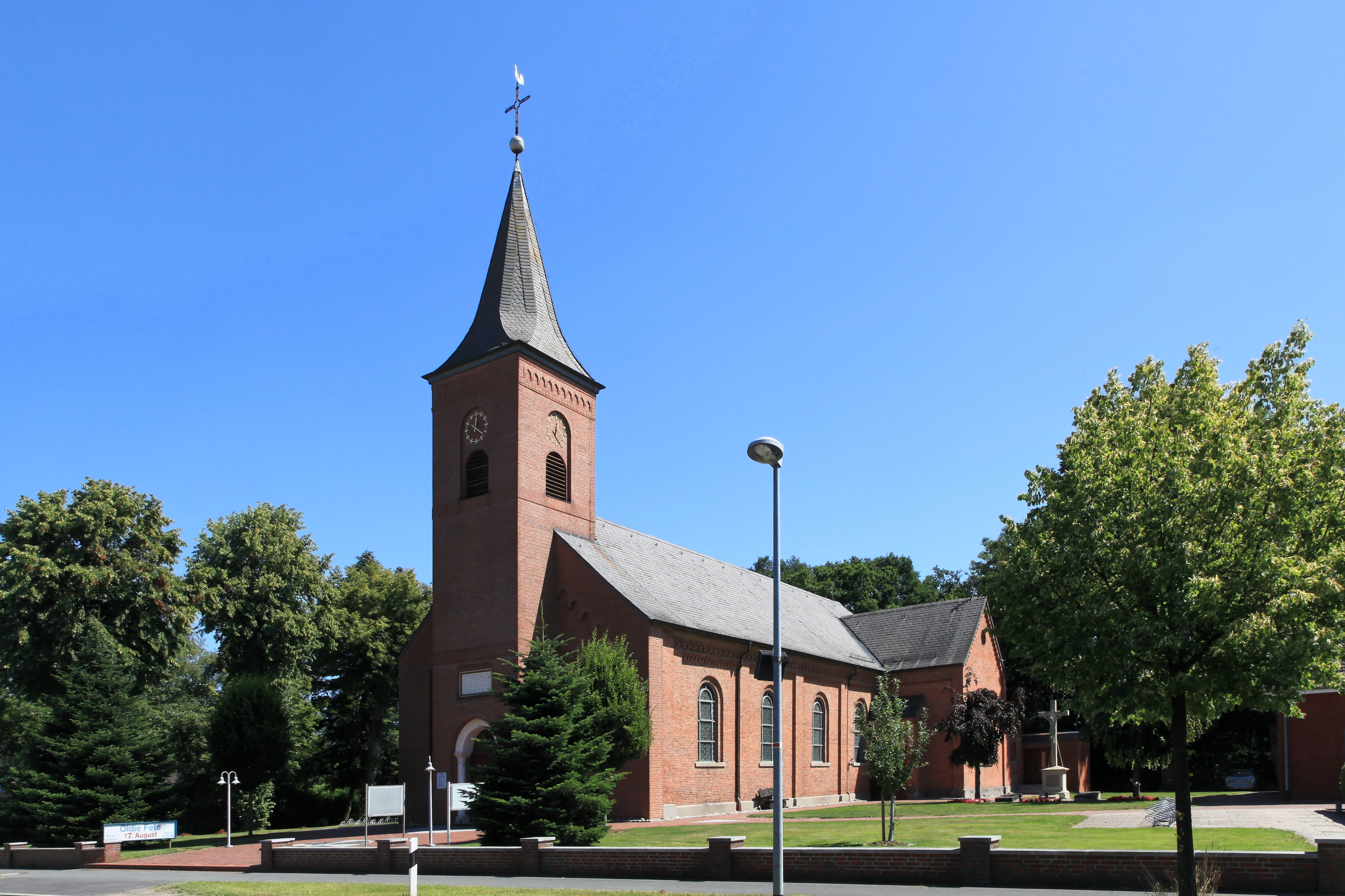 St. Bonifatius, Kirchstraße in Rhauderfehn